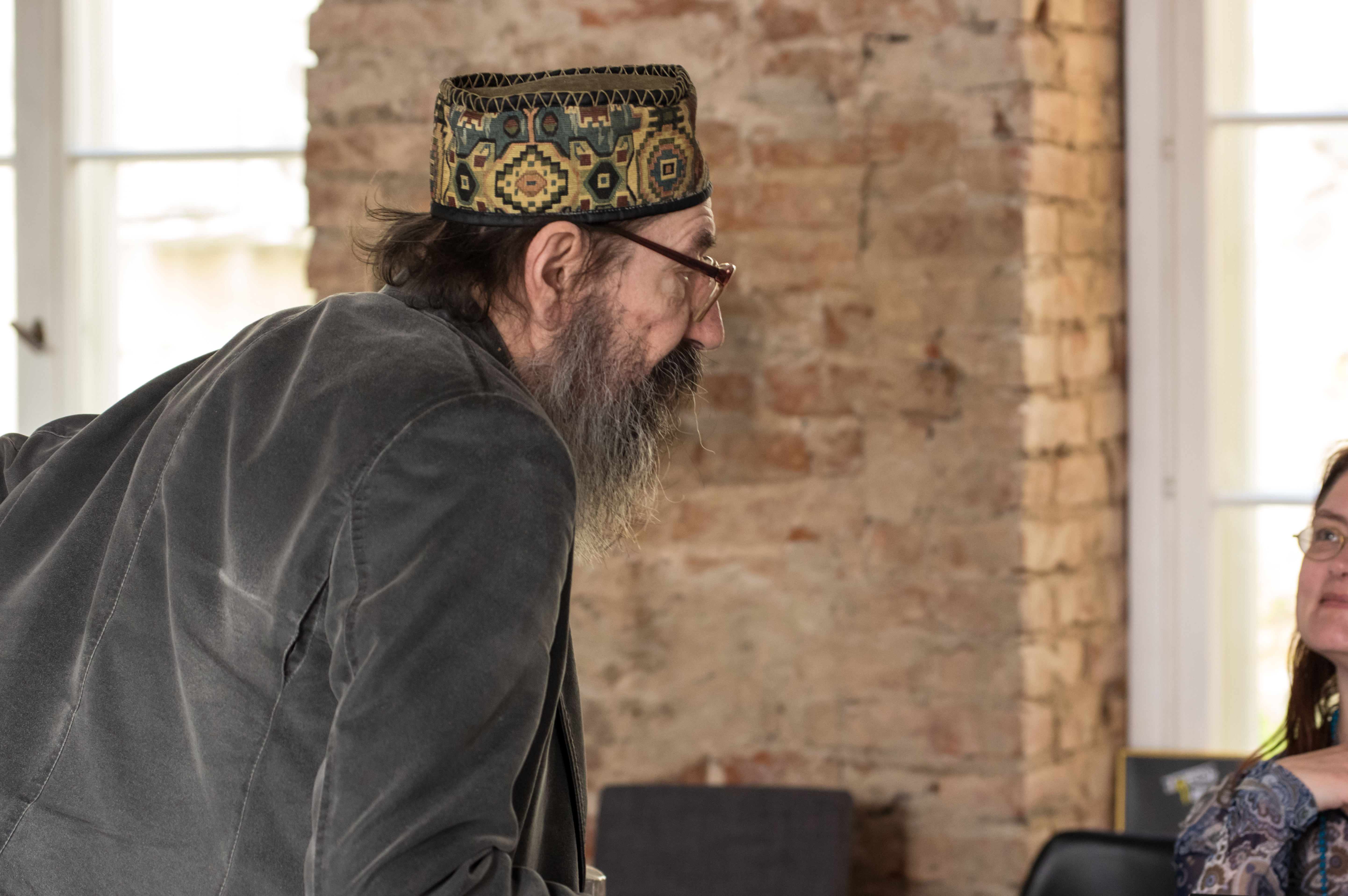 Uus vikipedist Prima Vista kirjutamismaratonil